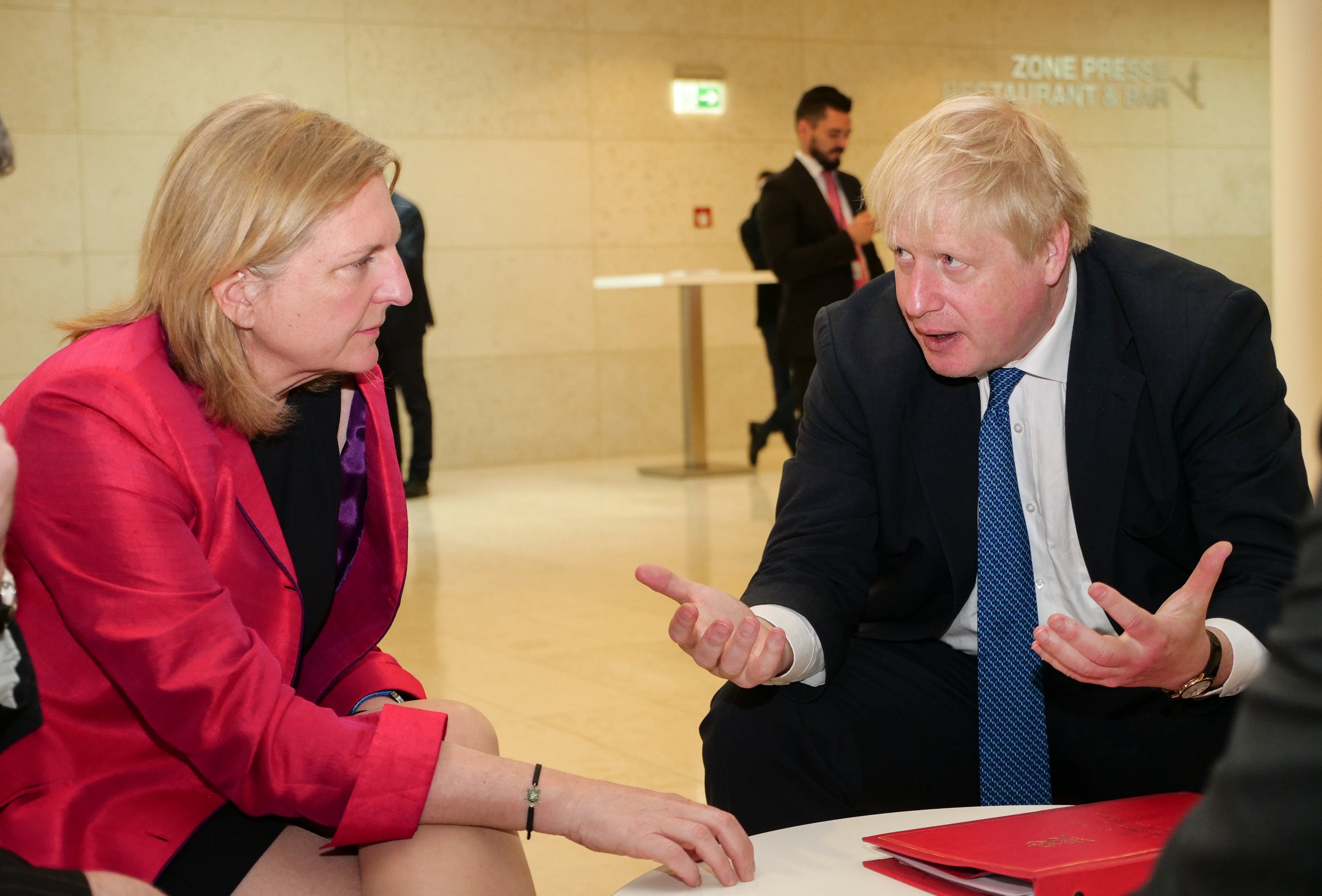 'Bilaterales Gespräch zwischen Bundesministerin Karin Kneissl und dem britischen Außenminister Boris Johnson